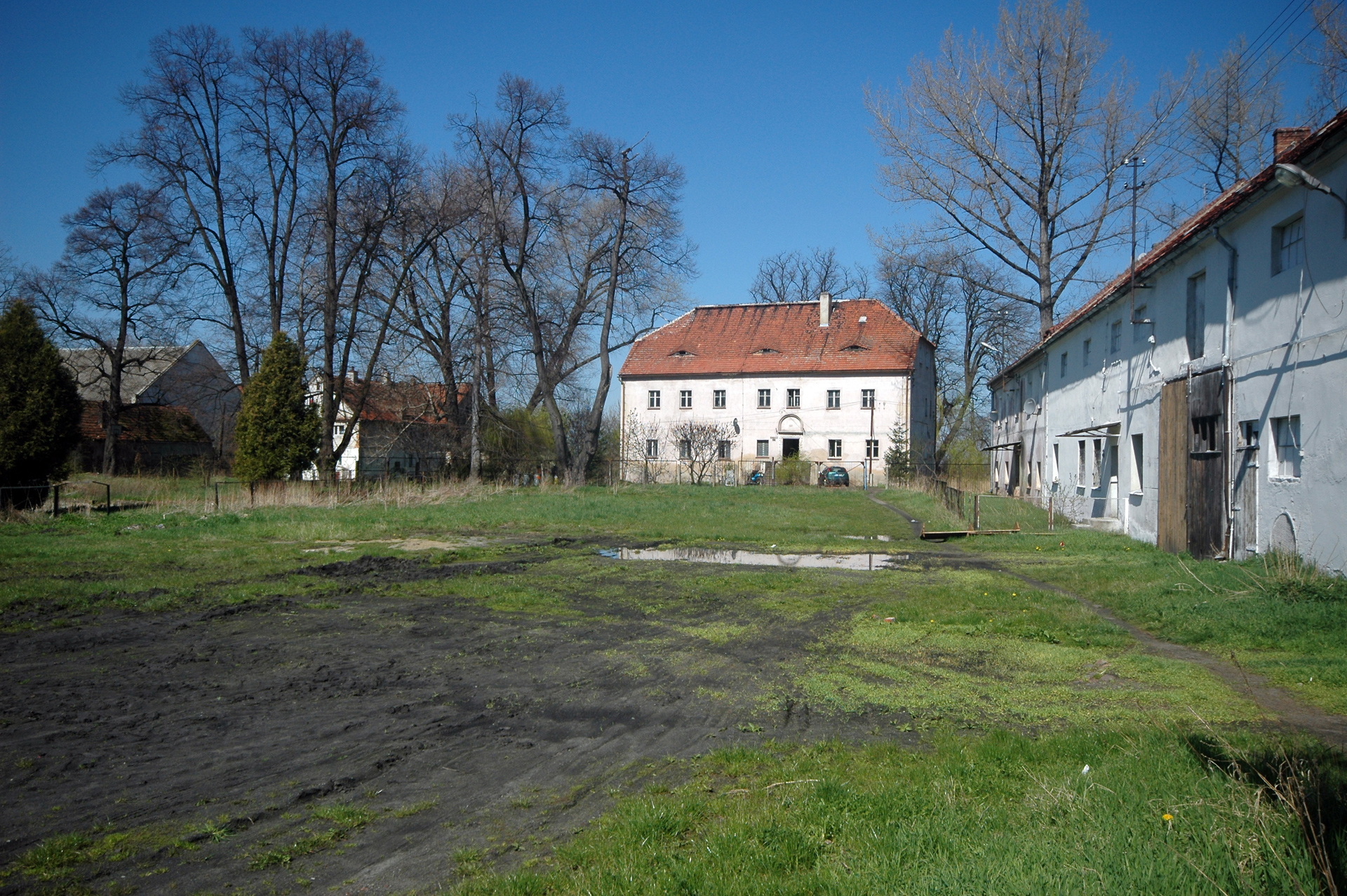 dwór Uciechów, Wrocławska 5, Dzierżoniów